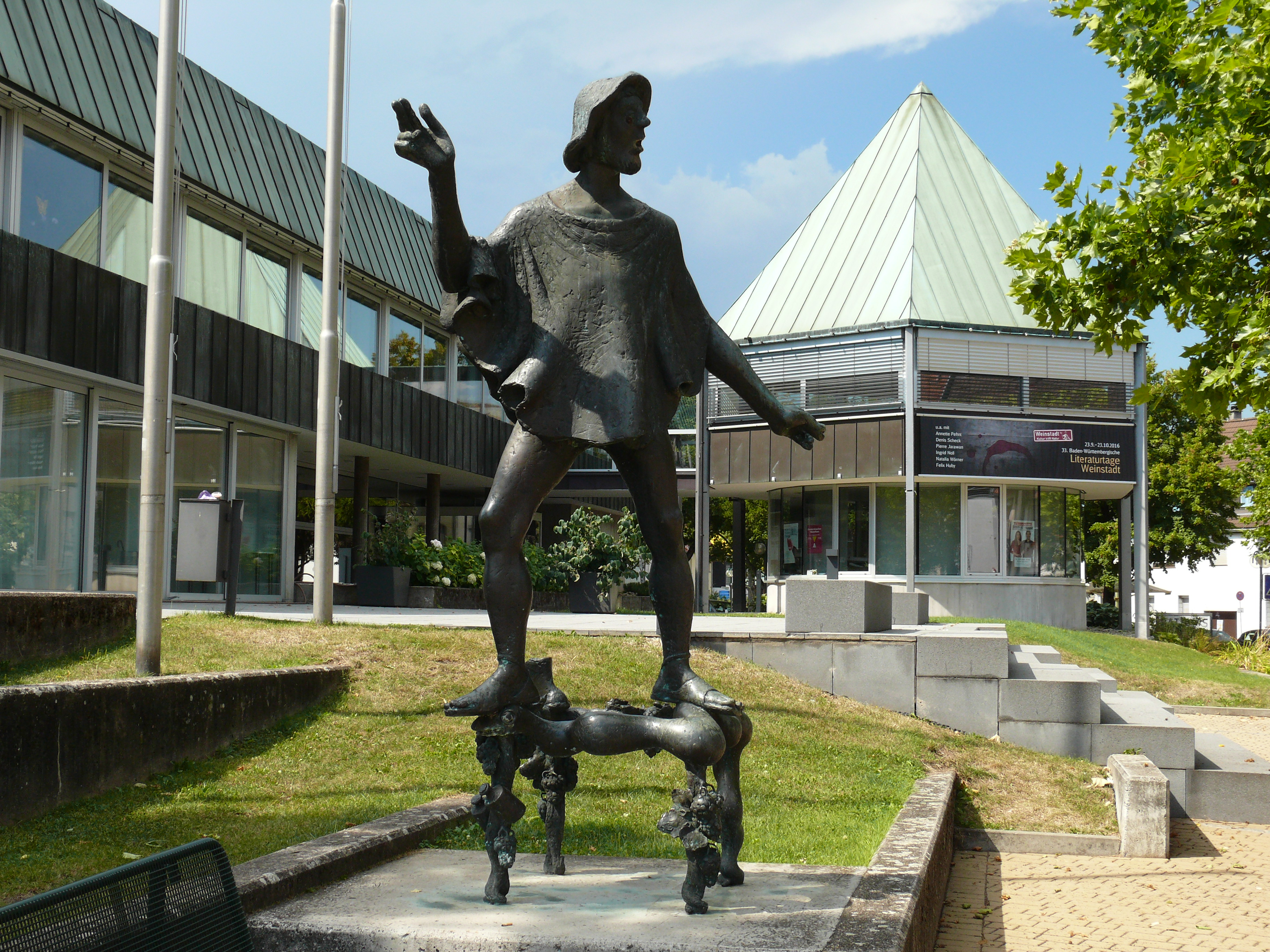 Gaispeter-Denkmal in Weinstadt-Beutelsbach vor dem Rathaus, zu Ehren dem Anführer der Bauernaufstandsbewegung "Armer Konrad" 1514.